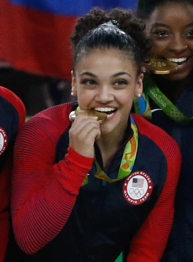 Rio de Janeiro - Ginastas dos Estados Unidos levam medalha de ouro na disputa por equipes feminina nos Jogos Olímpicos Rio 2016, Rússia fica com a prata e China, o bronze. (Fernando Frazão/Agência Brasil)